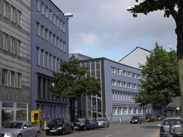 Der ehemalige Verwaltungskomplex der Jackstädt GmbH in Wuppertal, Bembergstraße/Hofkamp